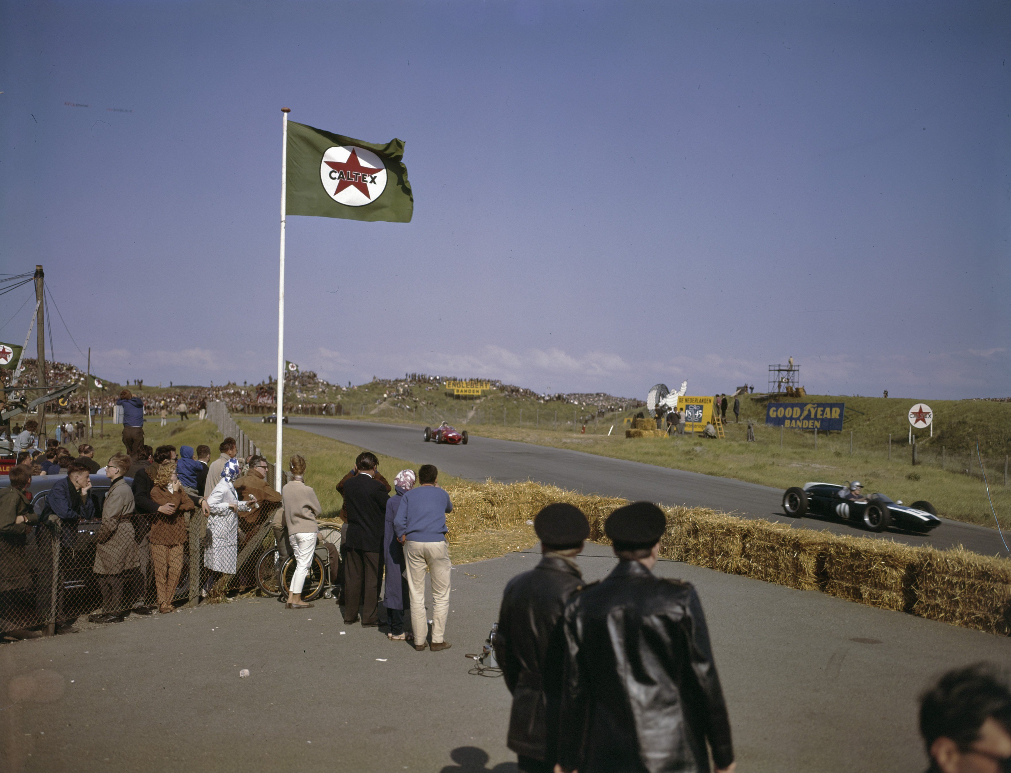 Collectie / Archief : Fotocollectie Anefo Reportage / Serie : [ onbekend ] Beschrijving : Autoraces, Grand Prix Datum : 22 mei 1965 (wrongly dated, should be 1961 Locatie : Noord-Holland, Zandvoort Trefwoorden : Autoraces Persoonsnaam : Grand Prix Fotograaf : Fotograaf Onbekend / Anefo Auteursrechthebbende : Nationaal Archief Materiaalsoort : Dia (kleur) Nummer archiefinventaris : bekijk toegang 2.24.01.08 Bestanddeelnummer : 254-7299